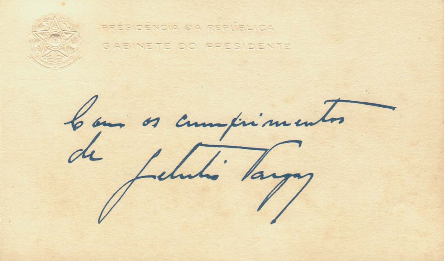 Cartão de visitas assinado pelo presidente Getúlio Vargas.